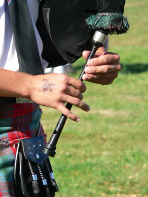 Bagpipe chanter.